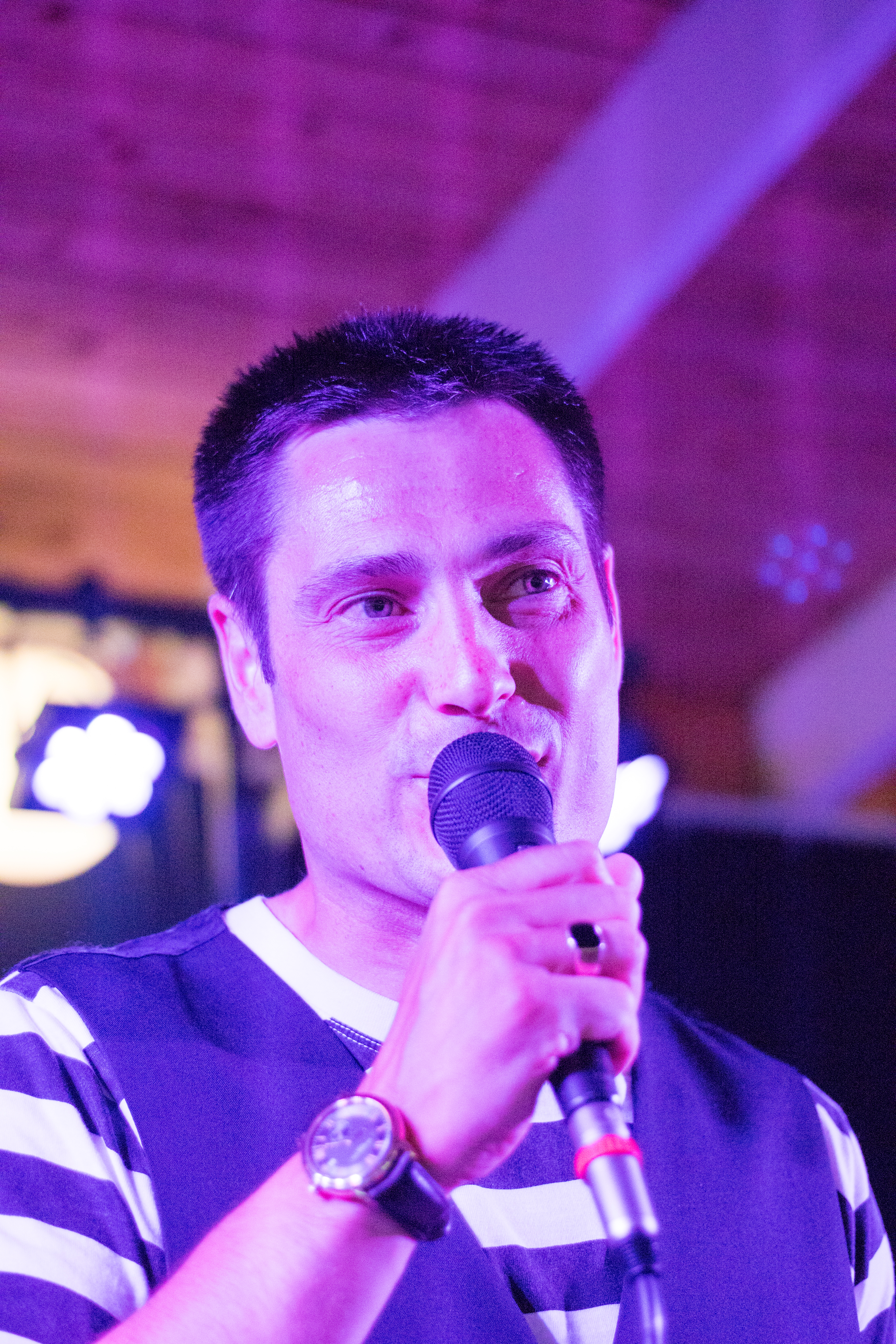 Tomi Markkola suomalainen laulaja